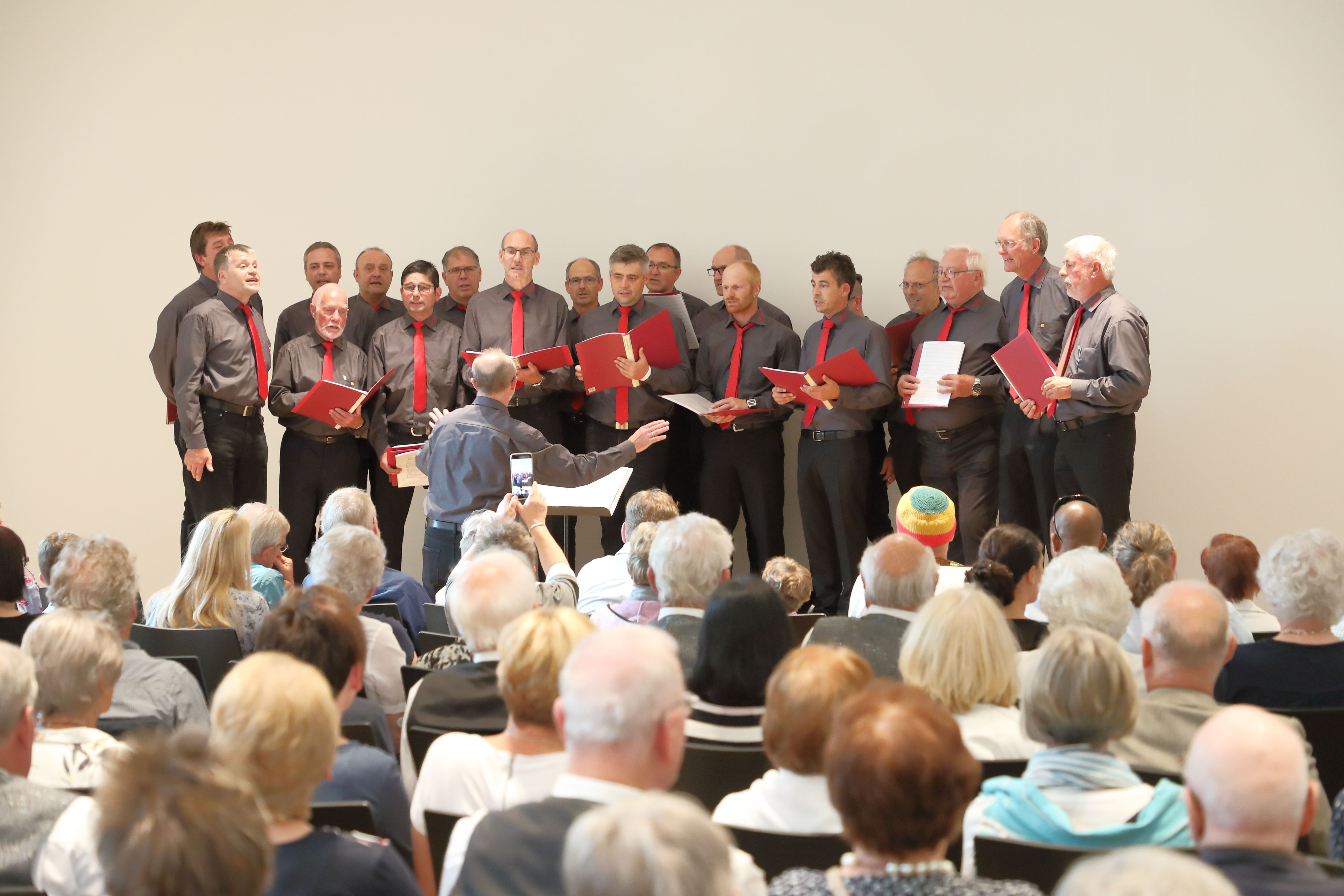 In der Tauberphilharmonie Weikersheim am Tag der Eröffnung im Juli 2019. Gesangsvortrag durch den Sängerkranz Schäftersheim.